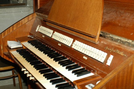 Manuali dell'Organo di San Cesareo in Palatio (Roma) Foto M/ (settembre 2003)